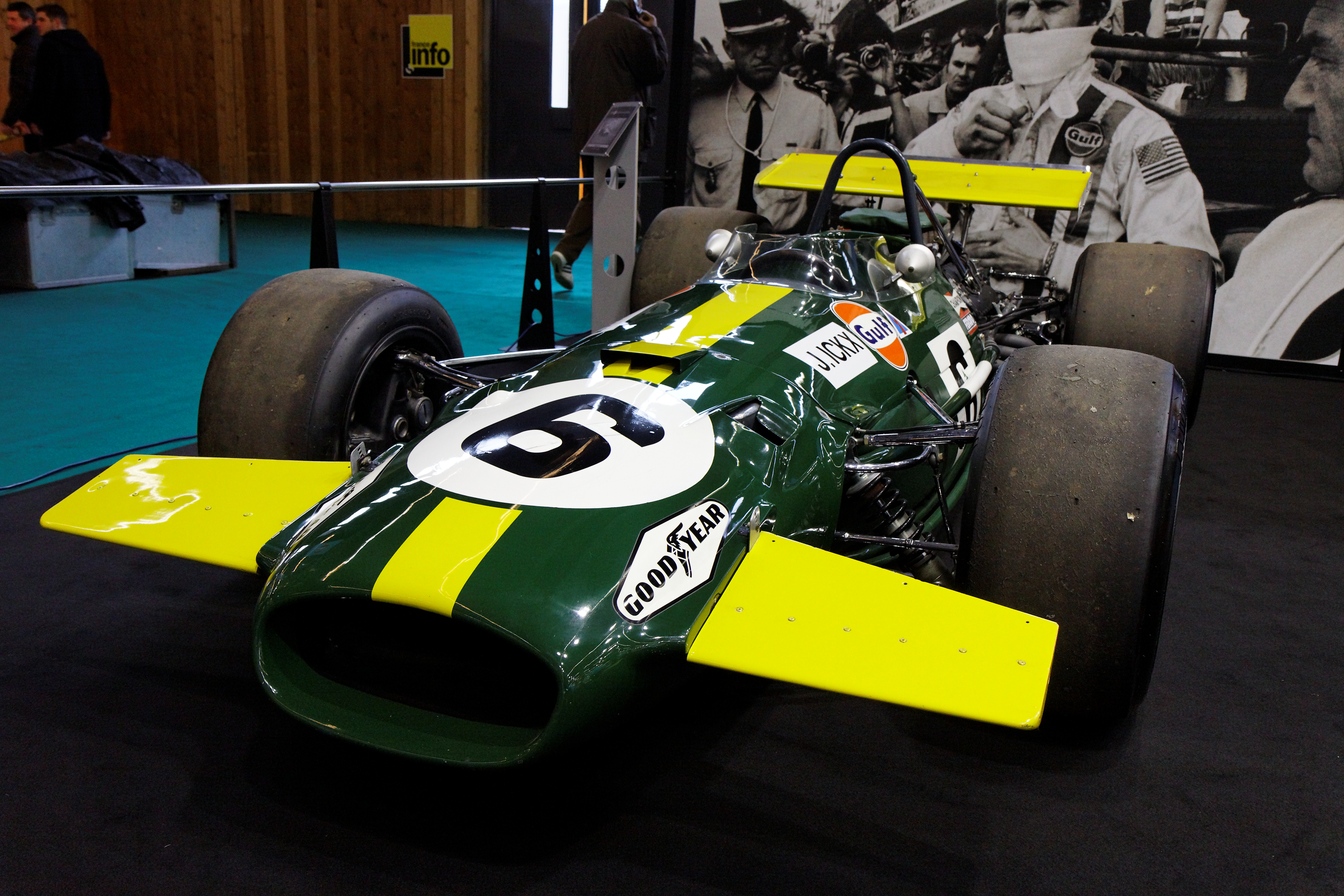 Photographie prise lors du salon rétromobile 2011 à Paris, porte de Versailles.